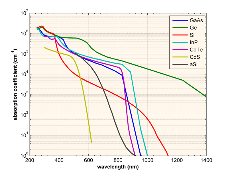 Het absorptiespectrum van verschillende halfgeleiders afgezet tegen de golflengte